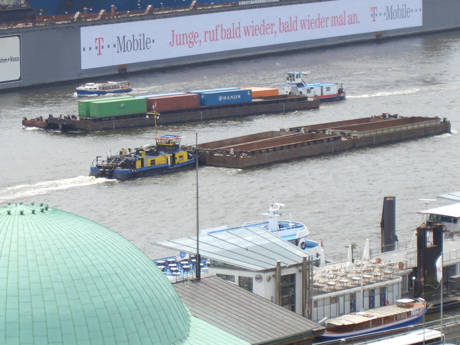 Schubverband auf der Elbe in Hamburg.